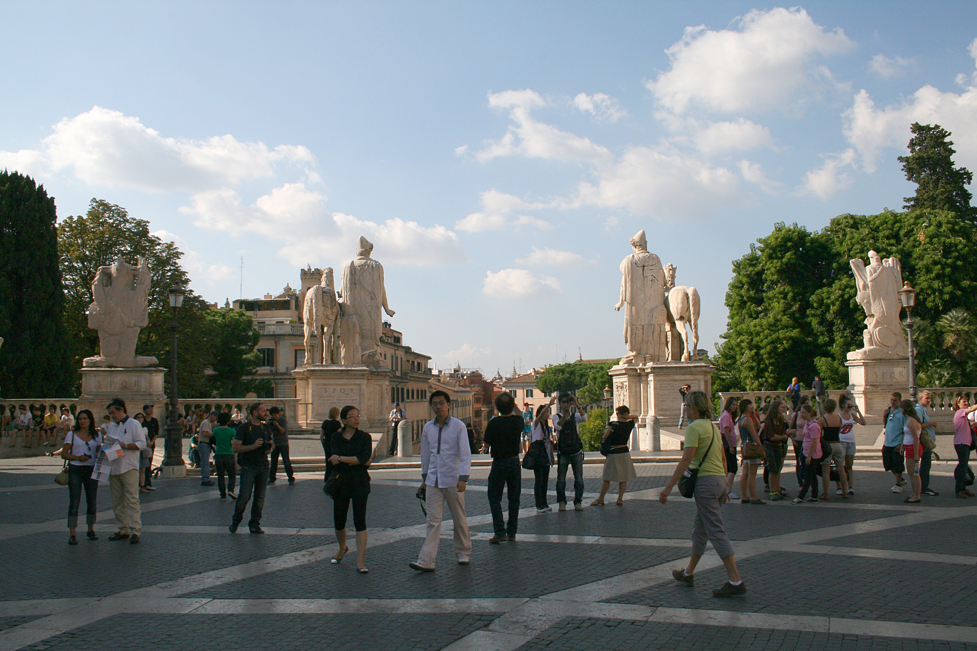 Piazza del Campidoglio, Rome.